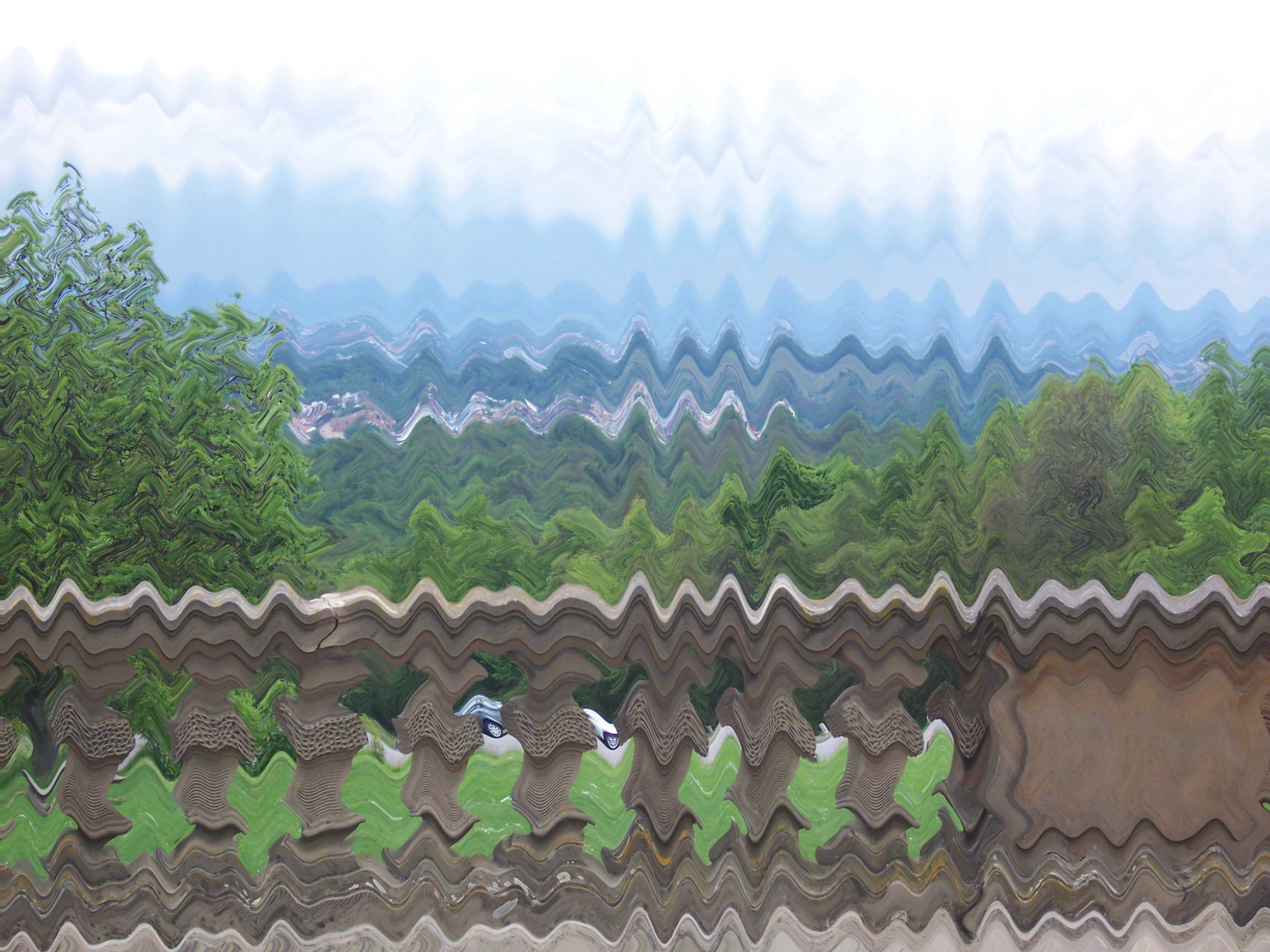 Verzerrungsfilter